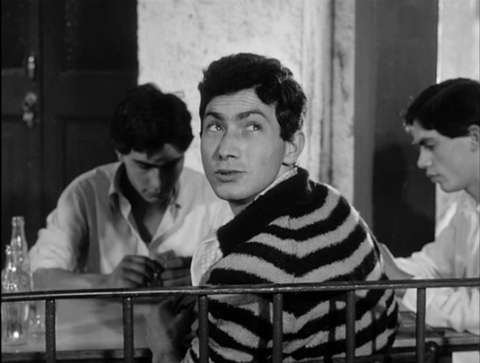 Accattone